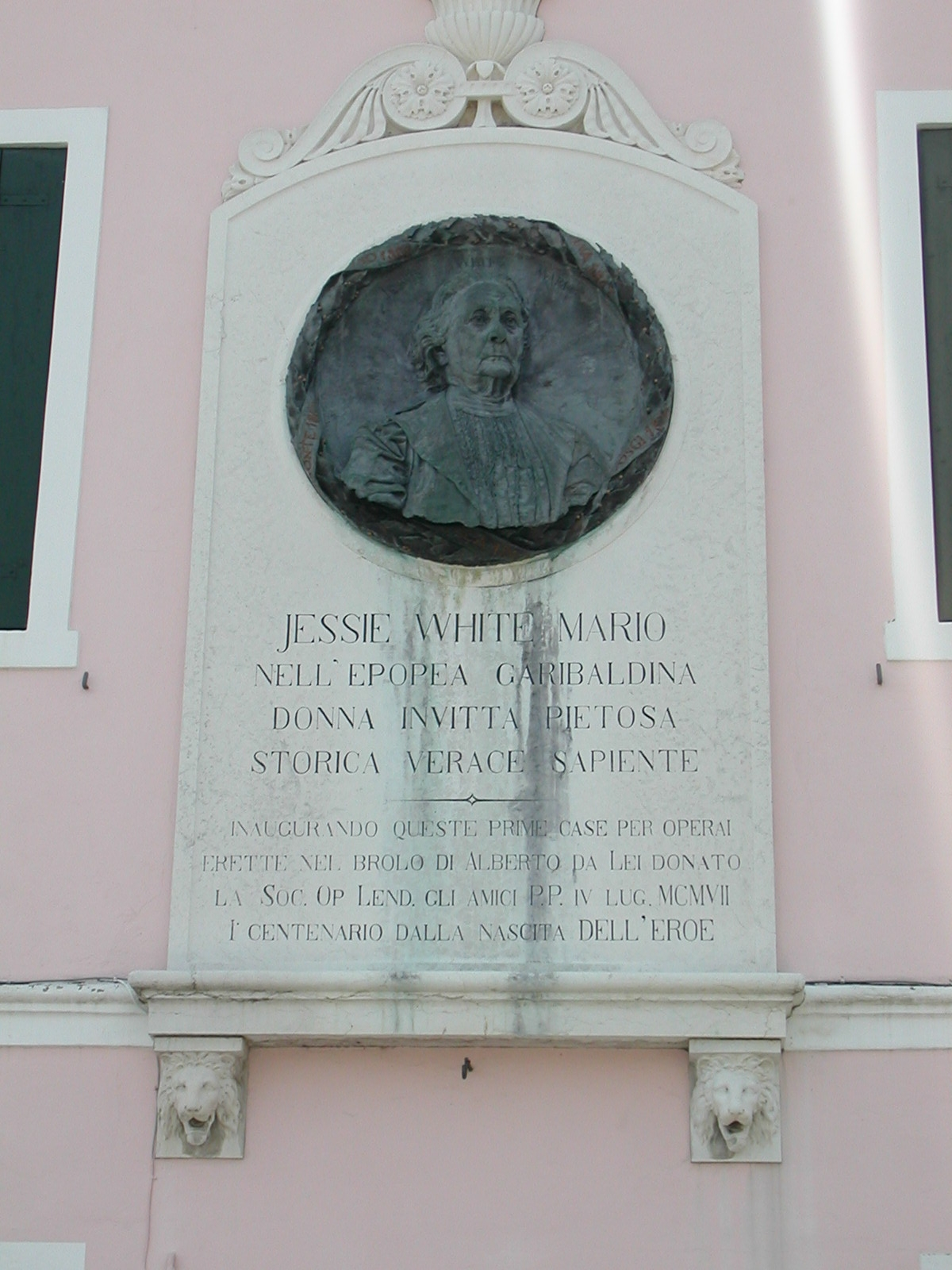 Targa commemorativa dedicata a Jessie White-Mario a Lendinara, provincia di Rovigo.